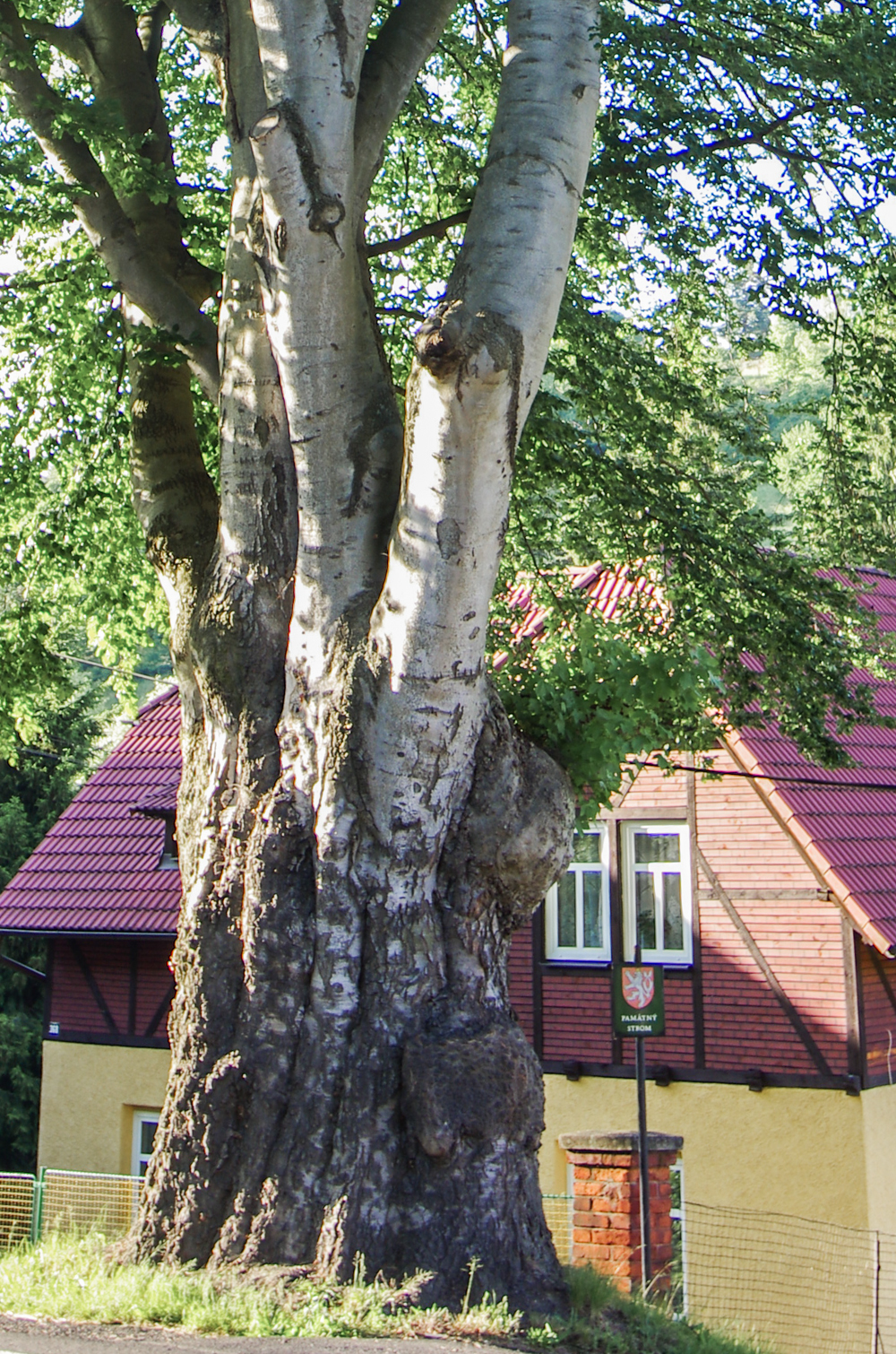 památný strom Buky nad Bečovem (dříve 2 stromy, nyní 1 strom), Bečov nad Teplou, Slavkovský les, okres Karlovy Vary